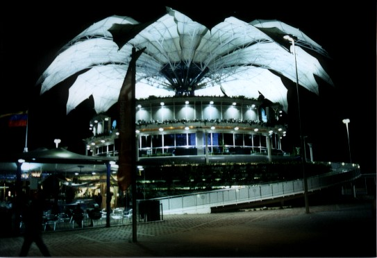 Pabellon de Venezuela en la Expo 2000, obra del arquitecto Venezolano Fruto Vivas